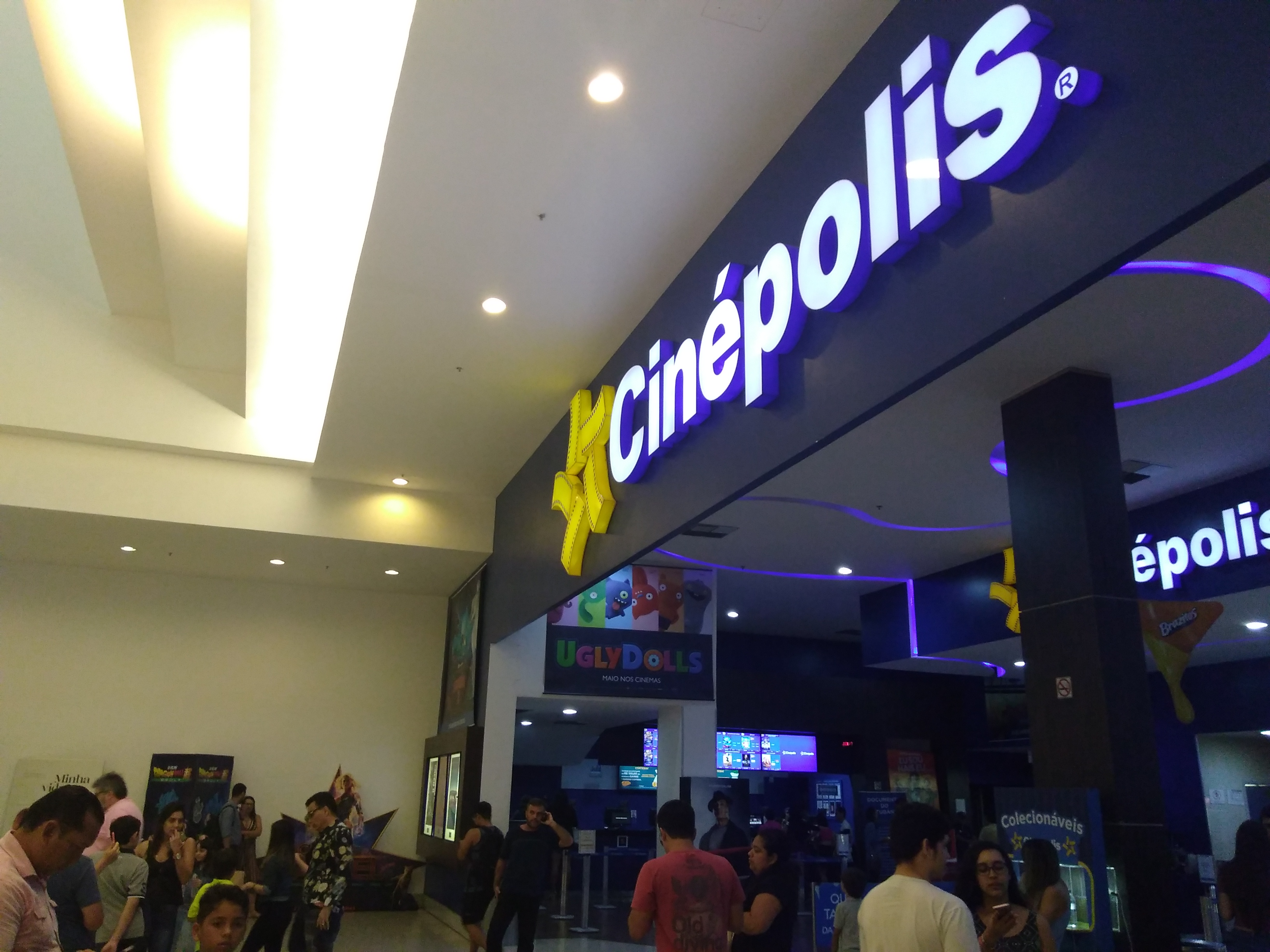 Fachada do Cinépolis Boulevard Belém